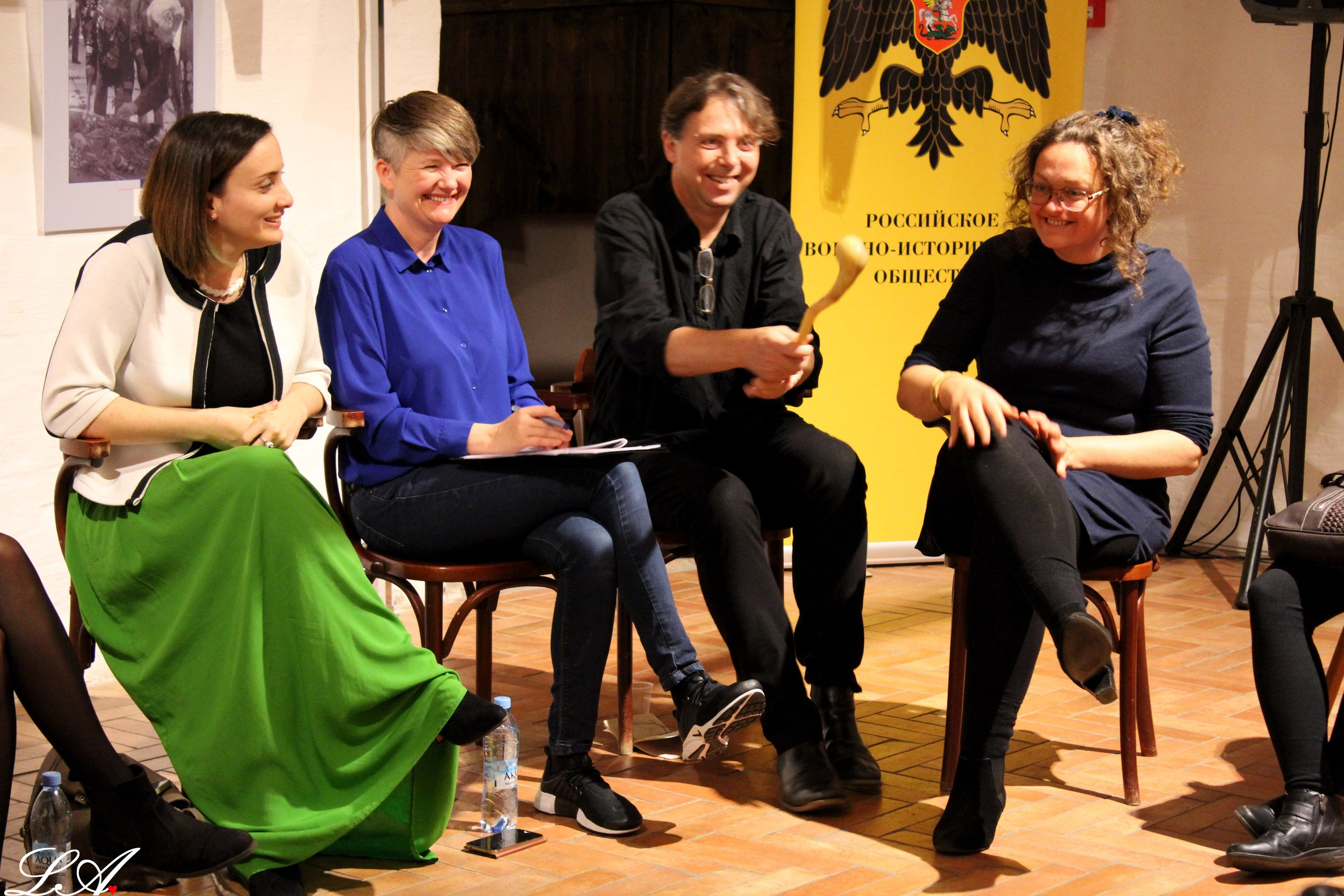 Arctic Art Forum 2016. Проект “Супы и истории”. Франc Якоби, Гитте Сeтрe, Анна Бутенко, Маргрете Колстад Брекке. В Архангельском краеведческом музее.